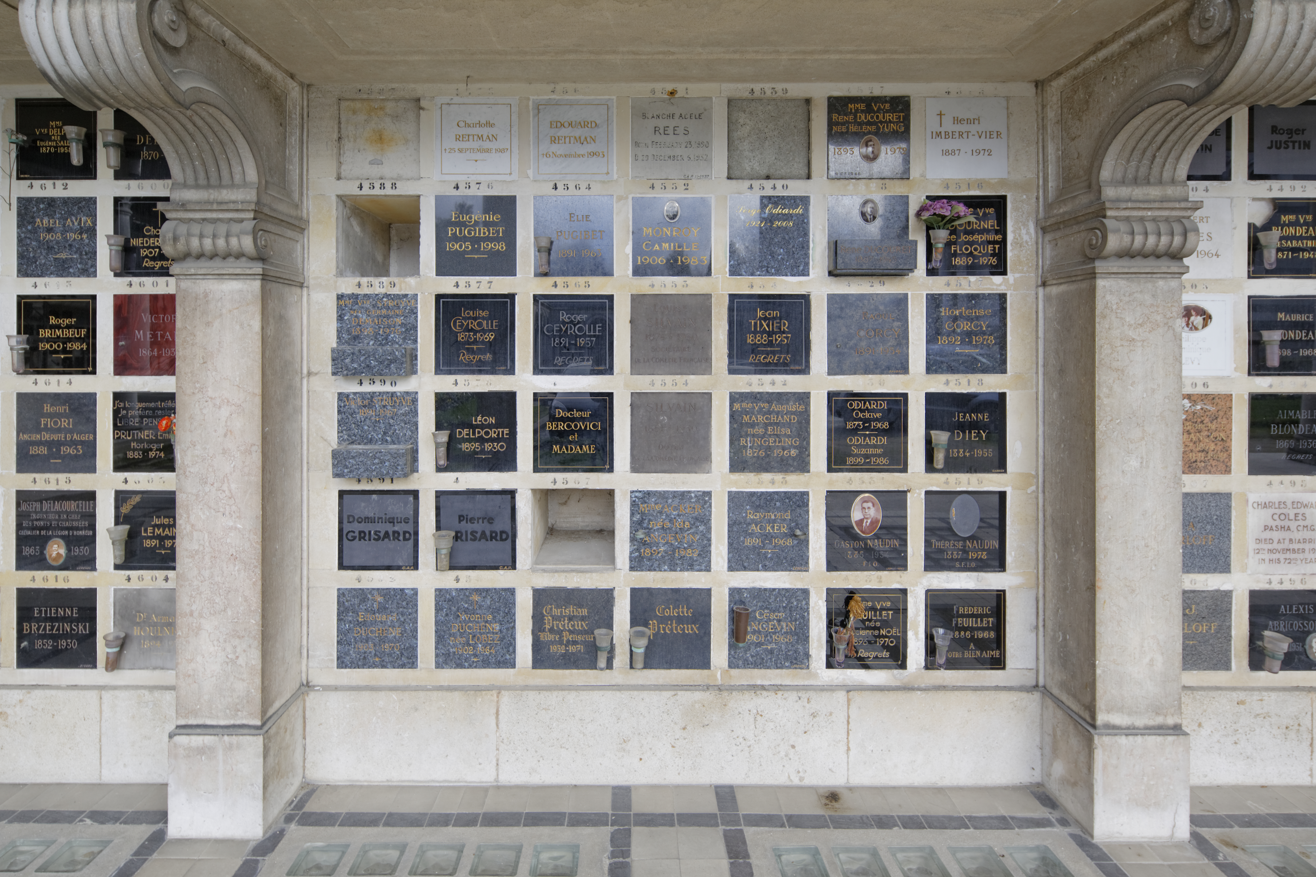 Cases du columbarium du cimetière du Père-Lachaise.